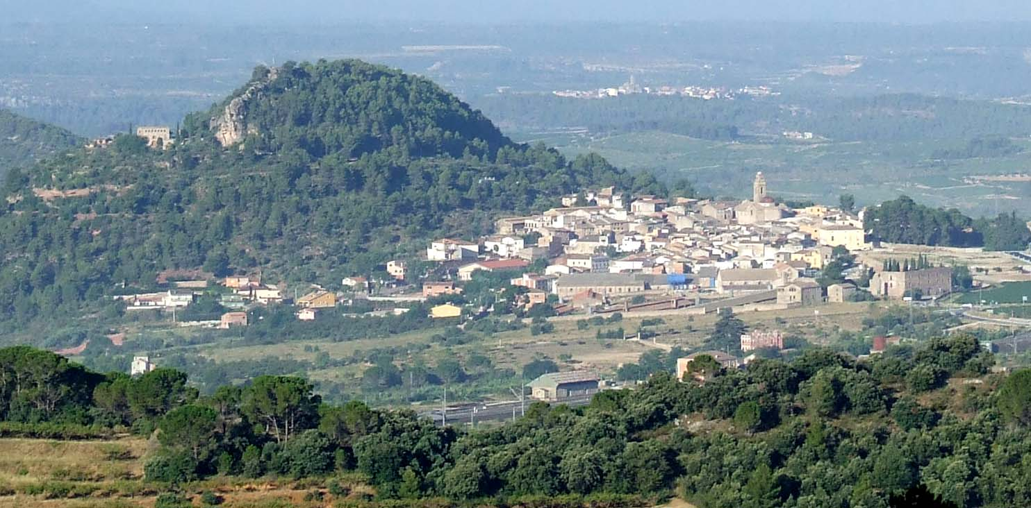 Vista general de Marçà des de Sant Cristòfol de Falset, al sud-est.